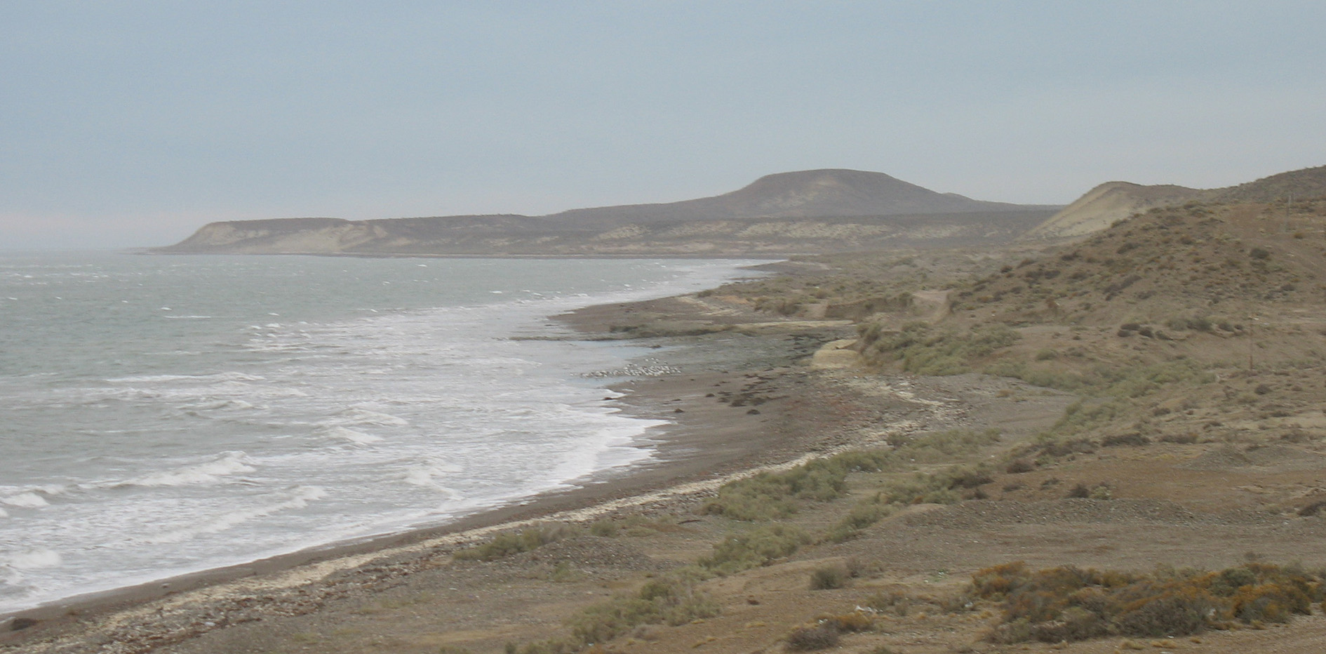 Vista de la costa de Bahía Lángara hacia el sur hacia Punta Murphy